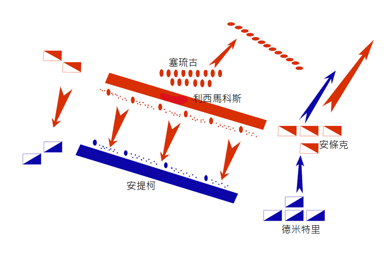 中文（台灣）: 伊普蘇斯戰役佈置圖中文版